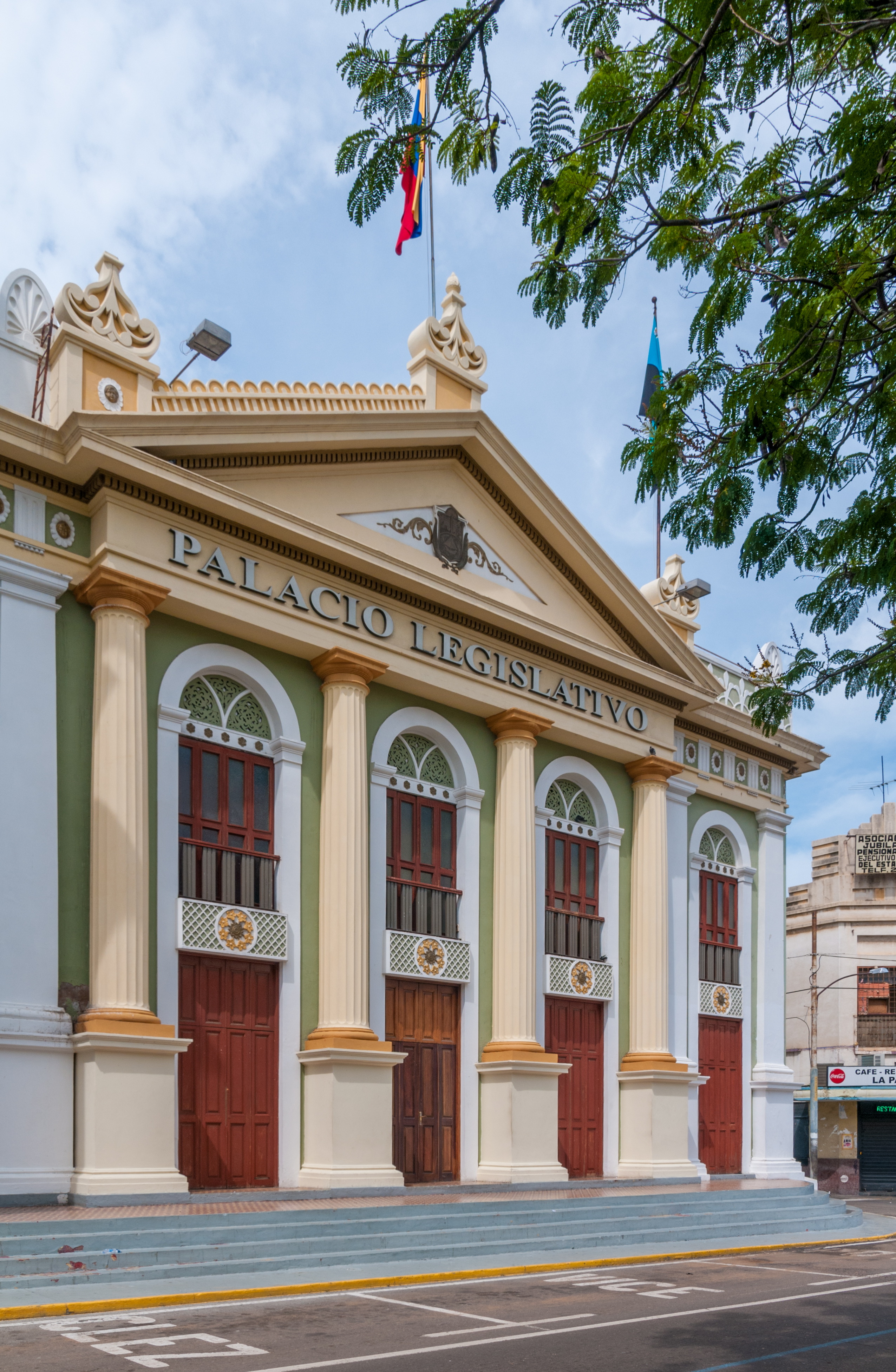 Palacio Legislativo de Maracaibo